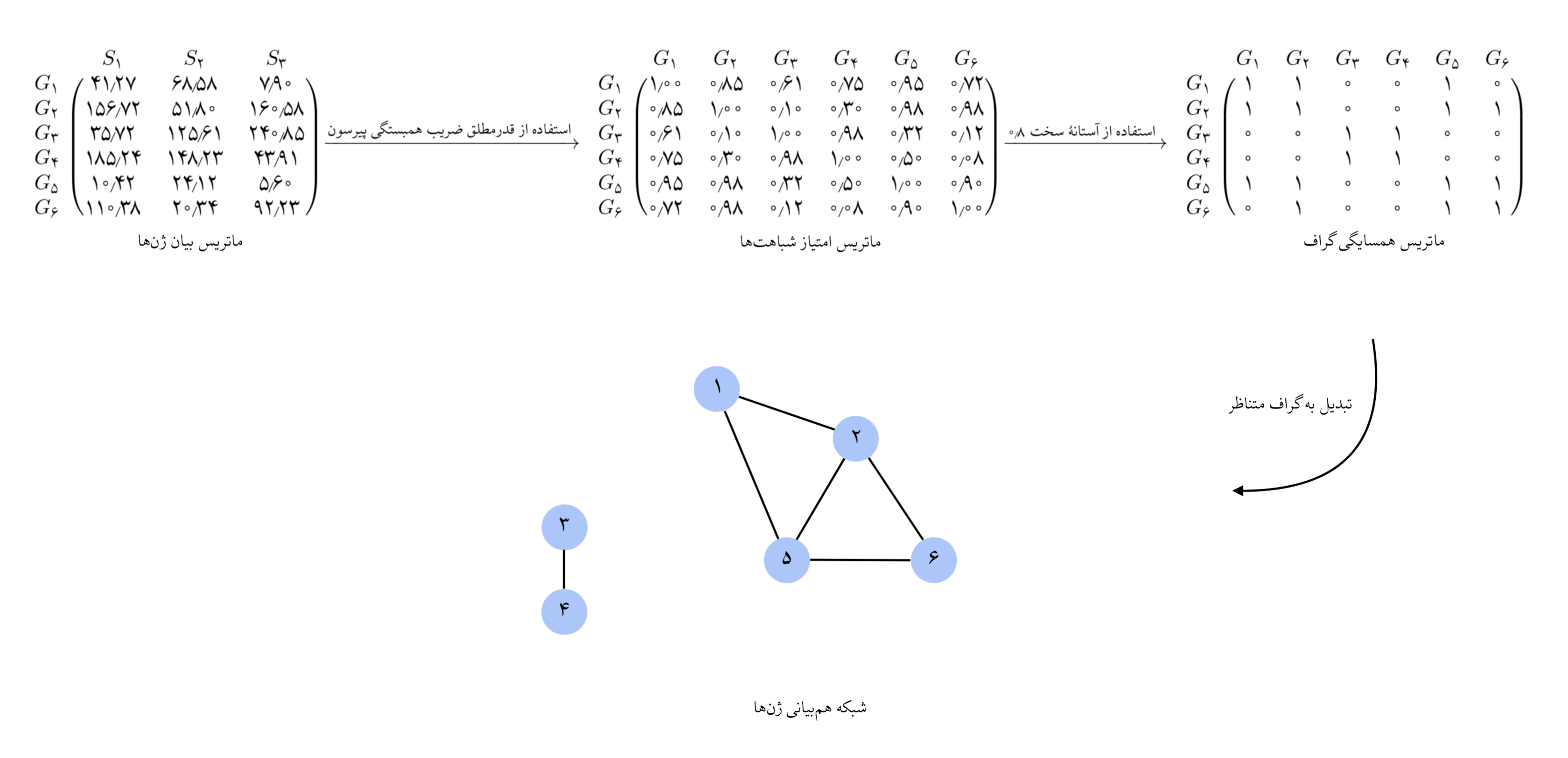 در این مثال عددی که به کمک لاتک و زبان پایتون تولید شده، مراحل تولید یک شبکه به نمایش گذاشته شده است.